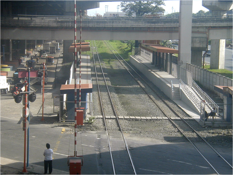 Tagalog: Ito ay kuha ko sa malapit sa South Luzon Expressway.